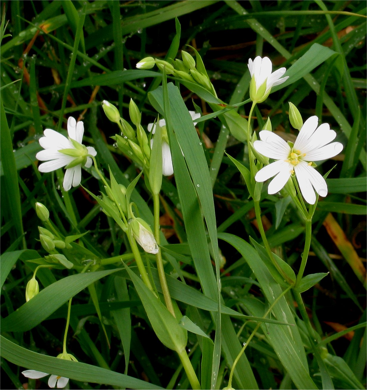 Stellaria holostea (Grote muur)